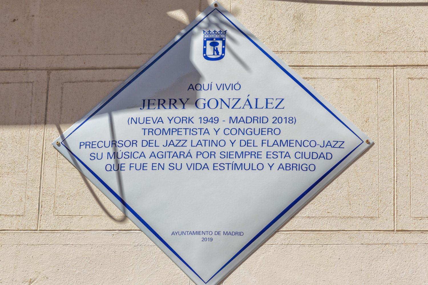 Madrid celebra hoy el Día Internacional del Jazz con un homenaje al maestro del latin jazz Jerry González, fallecido el pasado mes de octubre en un accidente. Esta mañana, el Ayuntamiento de Madrid y la asociación de salas La Noche en Vivo han colocado una placa conmemorativa en la calle Jesús y María, 34, del barrio de Lavapiés, donde el mítico trompetista de jazz neoyorkino residía desde el año 2000.